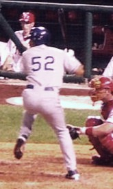 中文（台灣）: 2005年時期的陳金鋒。